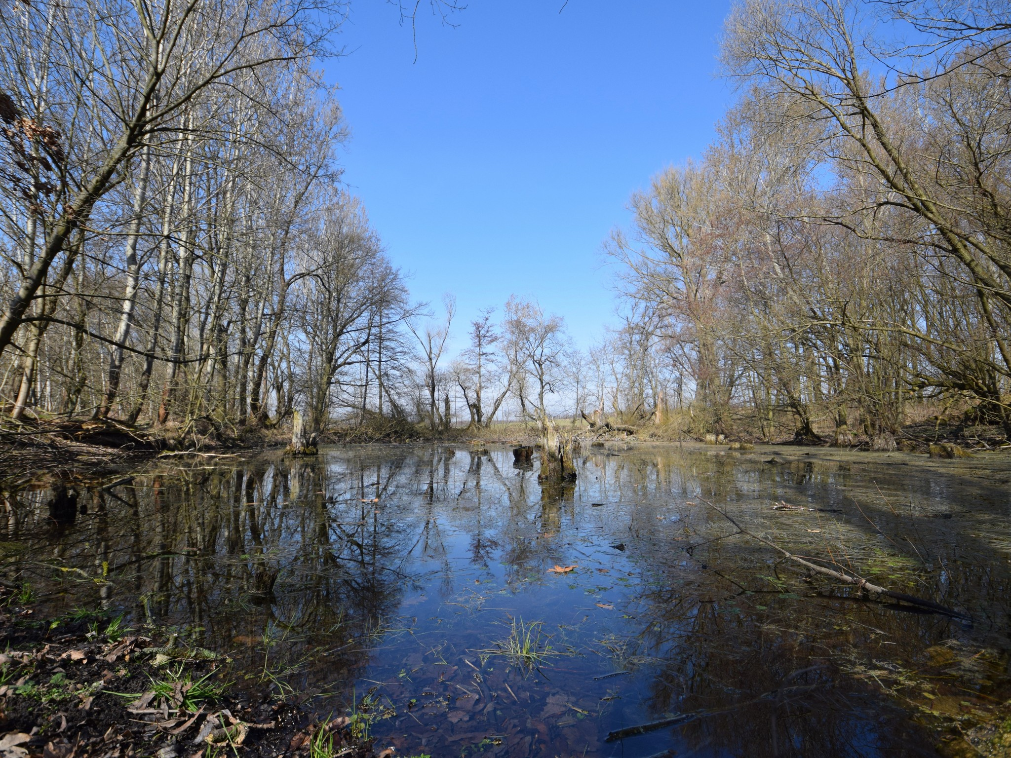 Ziegeleiteich II in Frankfurt (Oder)-Hohenwalde